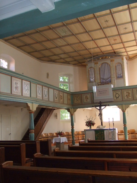 Kleinengstingen, Gemeinde Engstingen, Landkreis Reutlingen: Evangelische Blasiuskirche